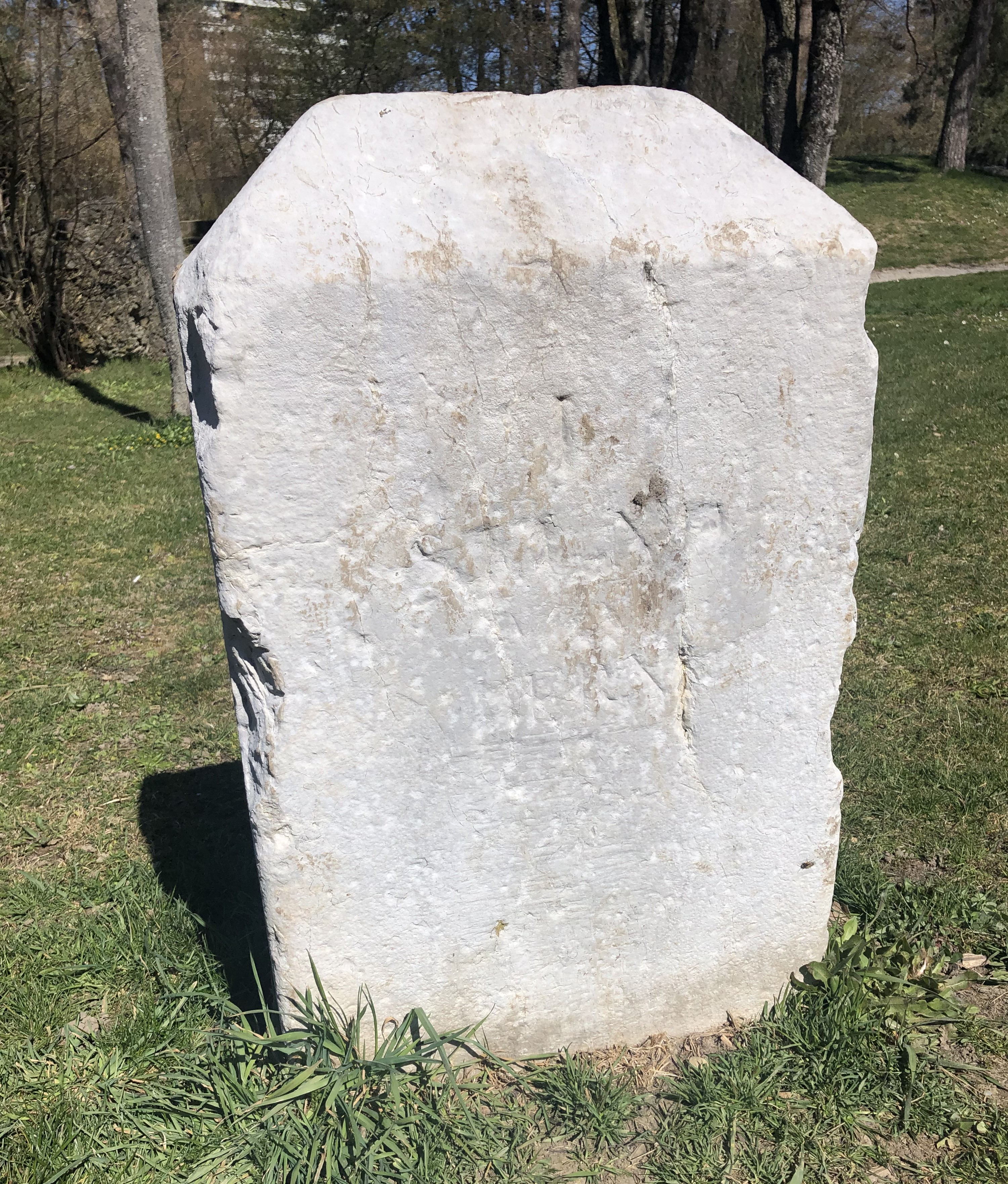 Bethlehemacker Stundenstein (leider schlecht reatauriert)